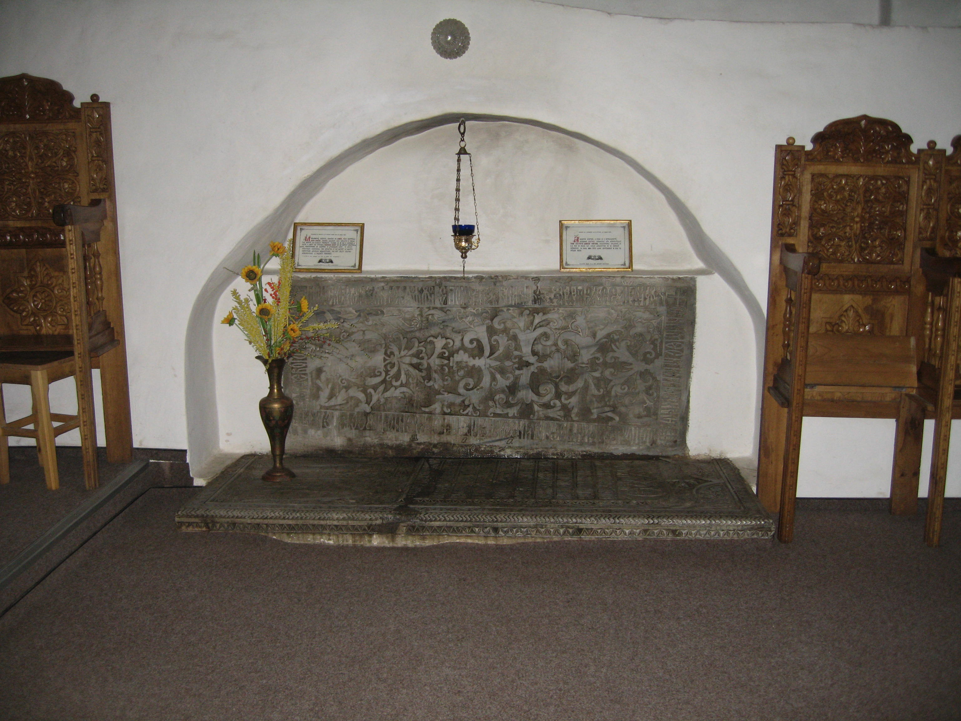 Pietrele de mormânt din Mănăstirea Bârnova